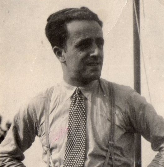 Immagine di Odoardo Focherini